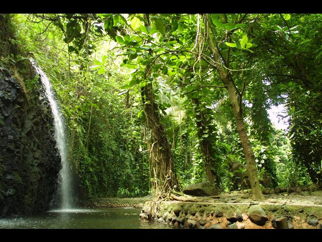 Belle photo prise de la cascade de Faaone située vers Vaihi.